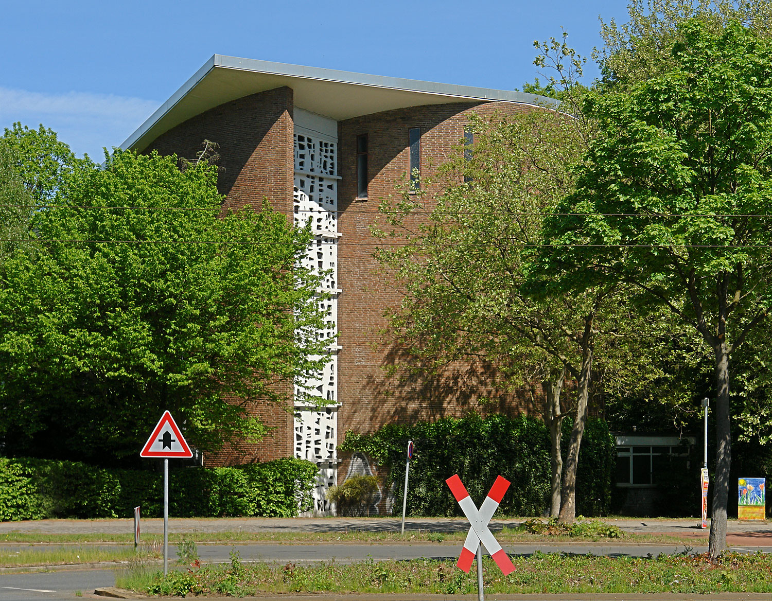 Kath. St.-Hedwig-Kirche der Pfarrgemeinde St. Raphael. Bremen, Kurt-Schumacher-Allee 62. Das abgebildete Objekt ist ein geschütztes Kulturdenkmal in der Freien Hansestadt Bremen, mit der Nr. 0823 beim Landesamt für Denkmalpflege registriert.